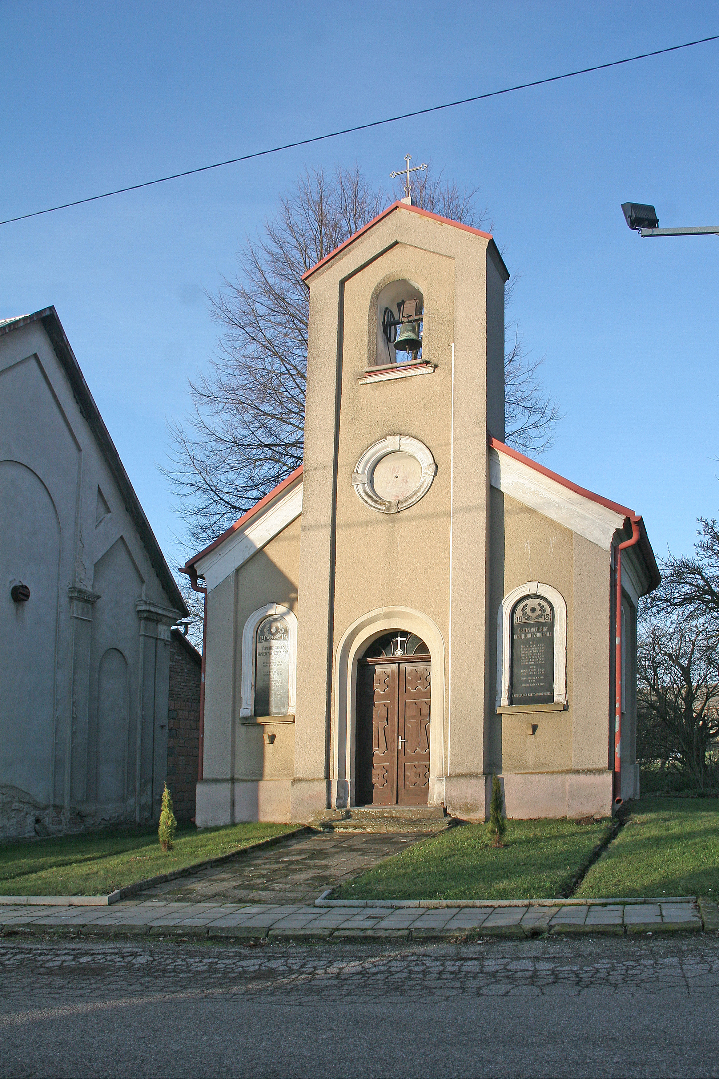 Záhornice kaple